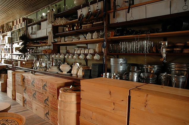 Parc Forillon (Parc nationnal fédéral) - Gaspésie (Québec)